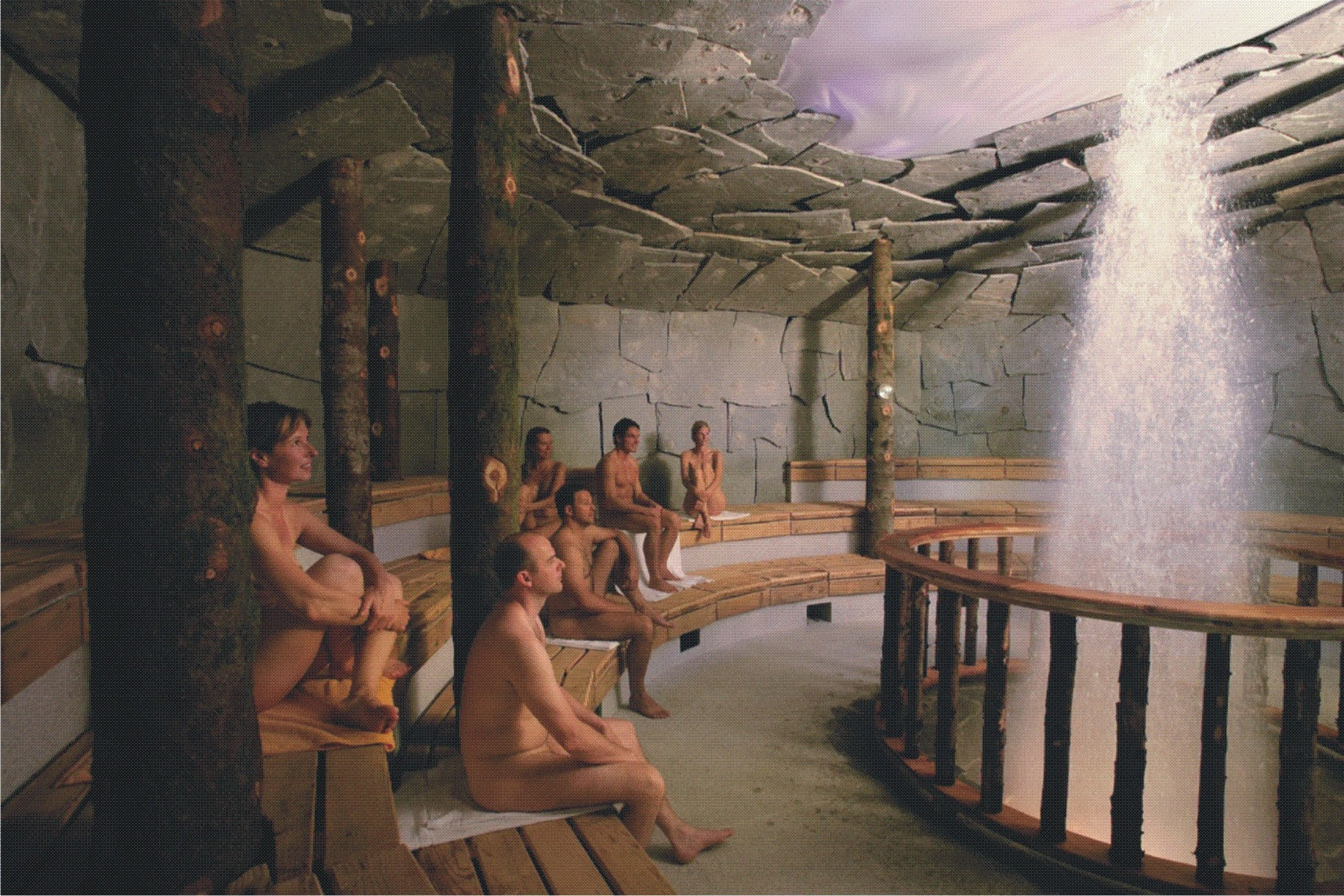 Geysirhöhle